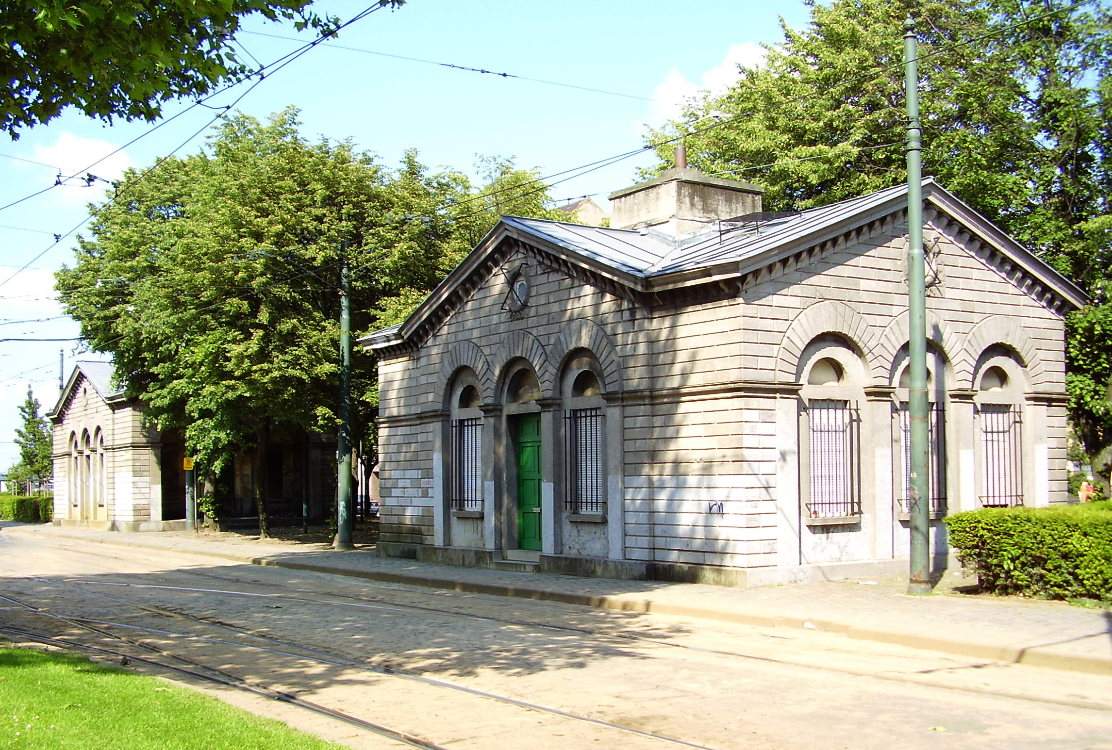 Description: Anciens pavillons d'octroi, place de Ninove, Bruxelles Author: User:Ben2 Date of creation: 06 juin 2006 Source: Photo personnelle